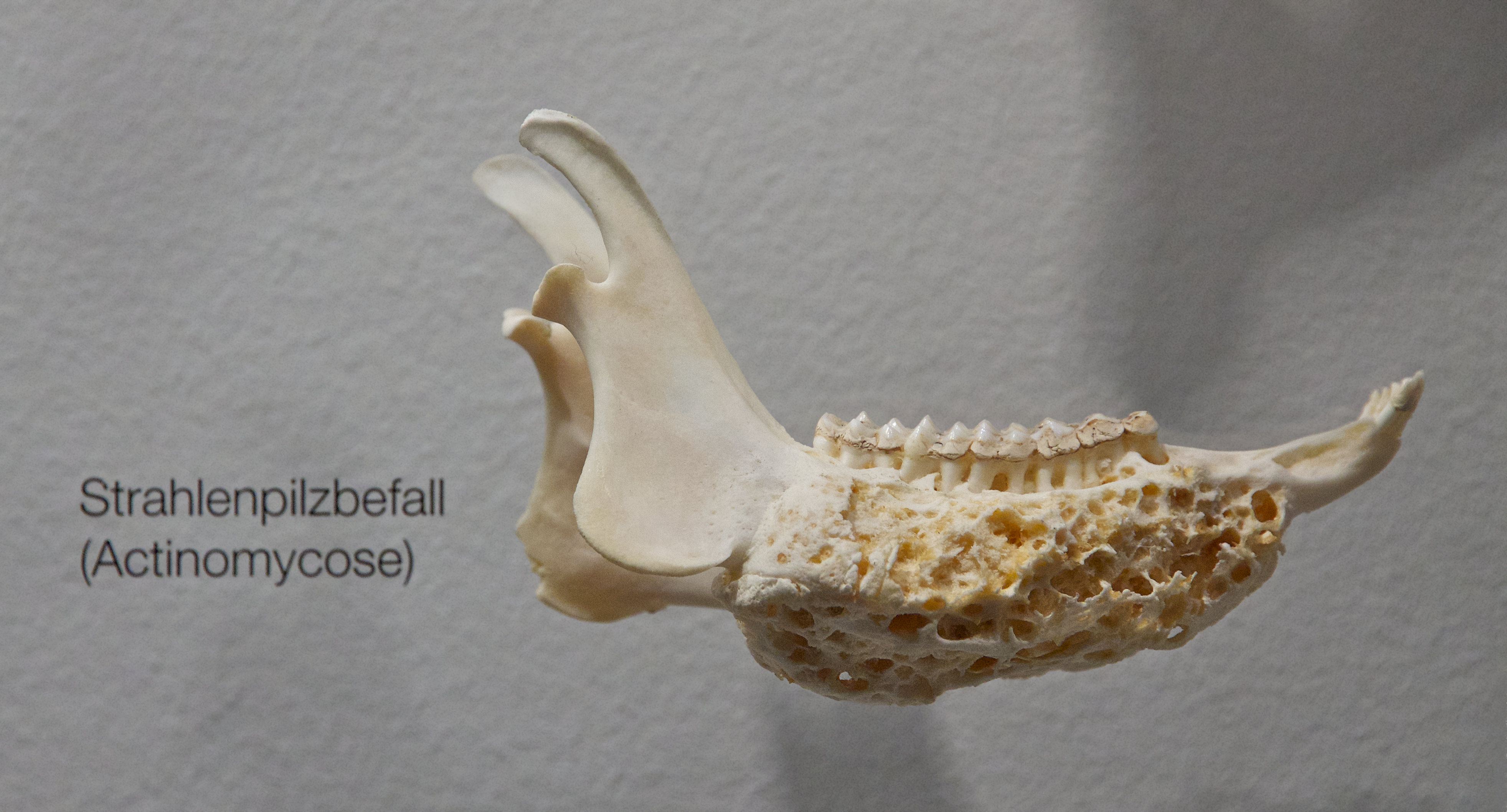 Actinomycose an einem Unterkiefer eines Rehs. Ausstellungsstück im Naturmuseum Olten.